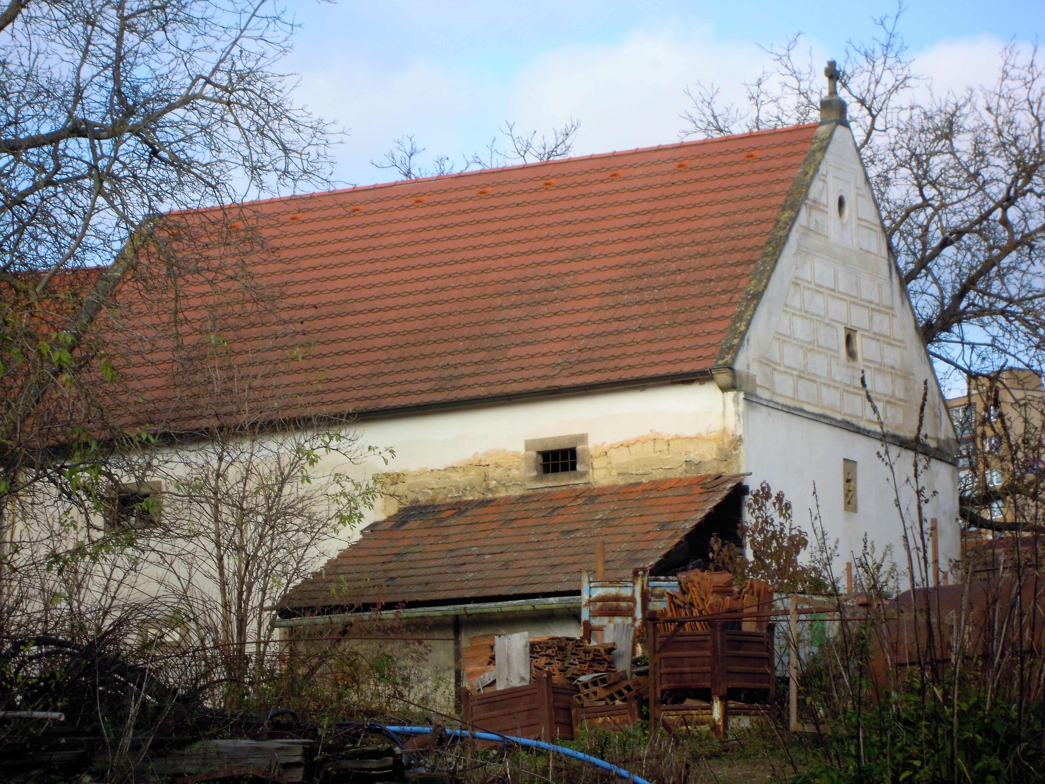 Plzeň-Bolevec, Hynaisova ulice, sýpka památkově chráněné usedlosti čp. 7 se sgrafitovou výzdobou východního štítu (16. st.)